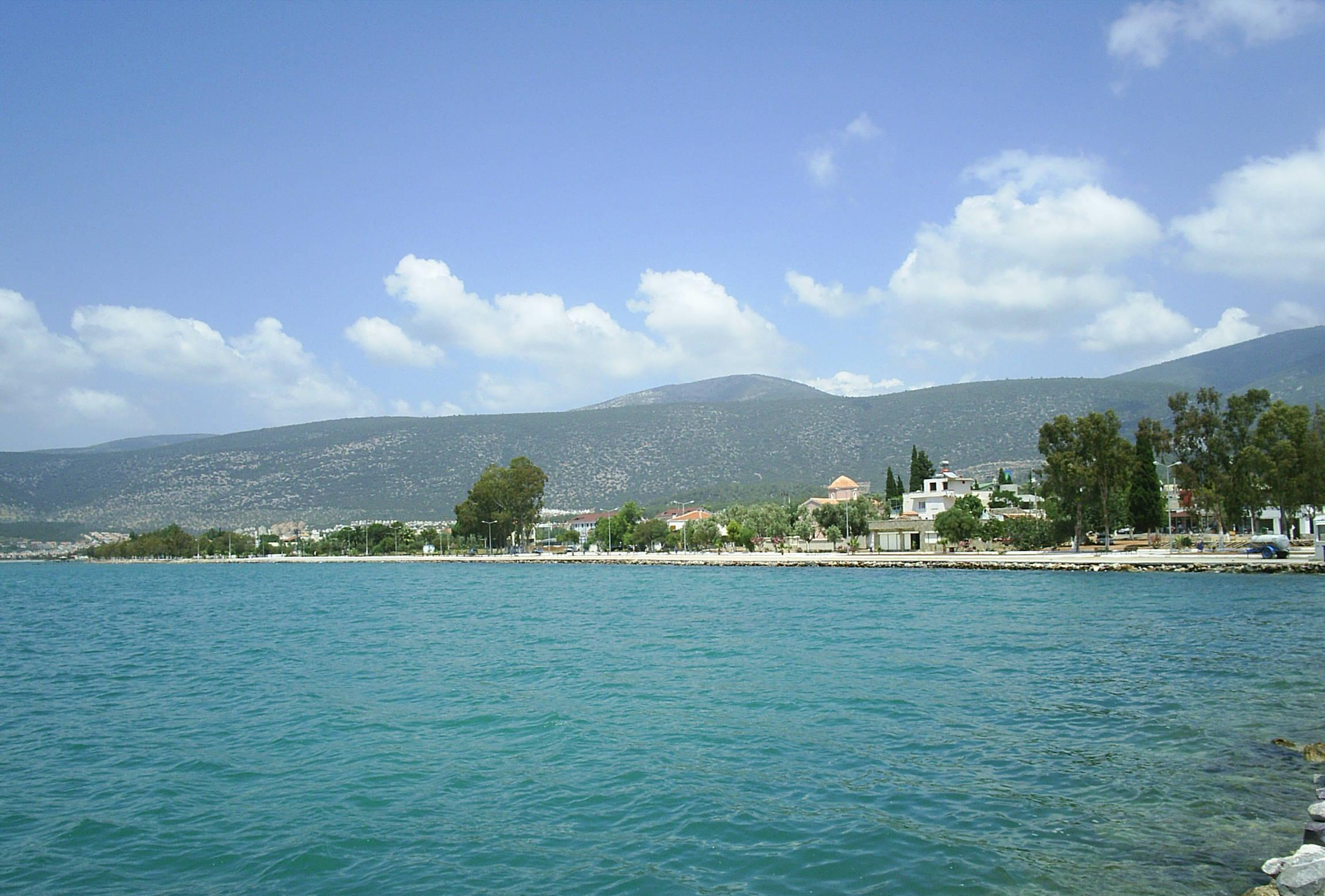 İskeleden Akbük'ün görünüşü